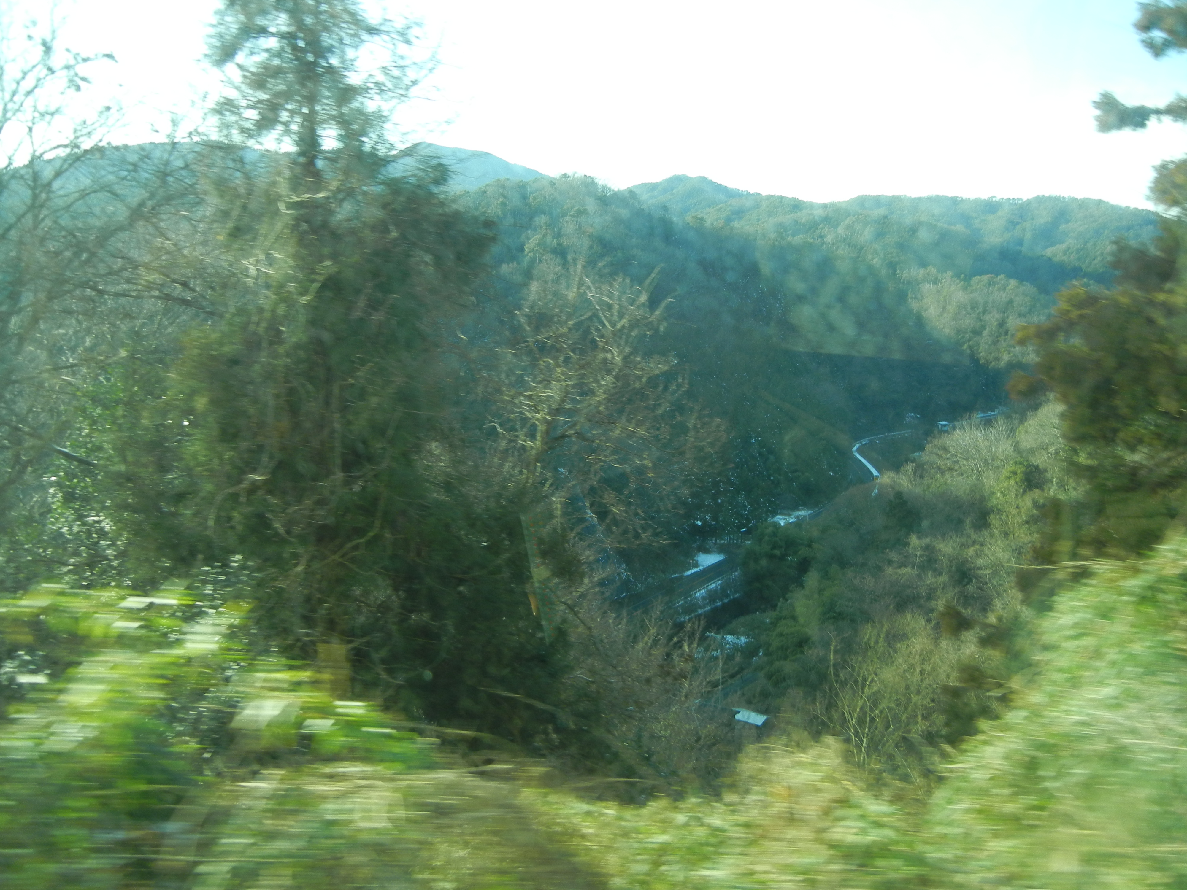 上根峠